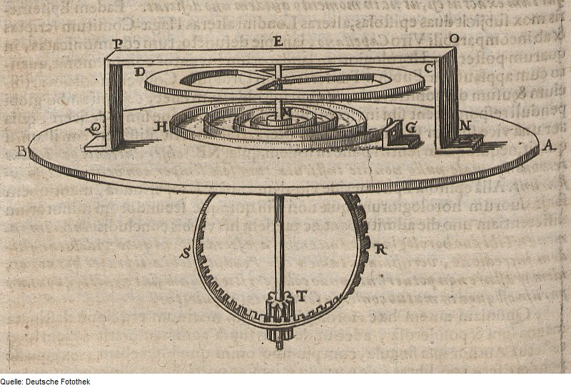 Original image description from the Deutsche Fotothek Uhr & Uhrwerk